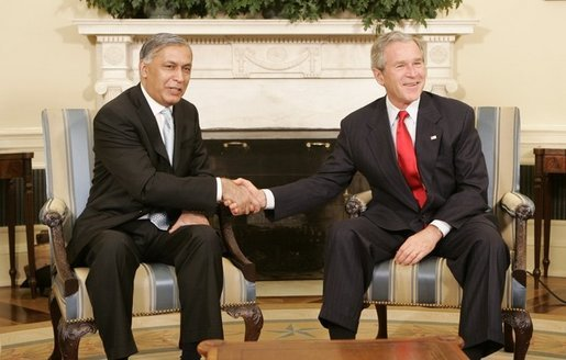 Shaukat Aziz with President George W. Bush